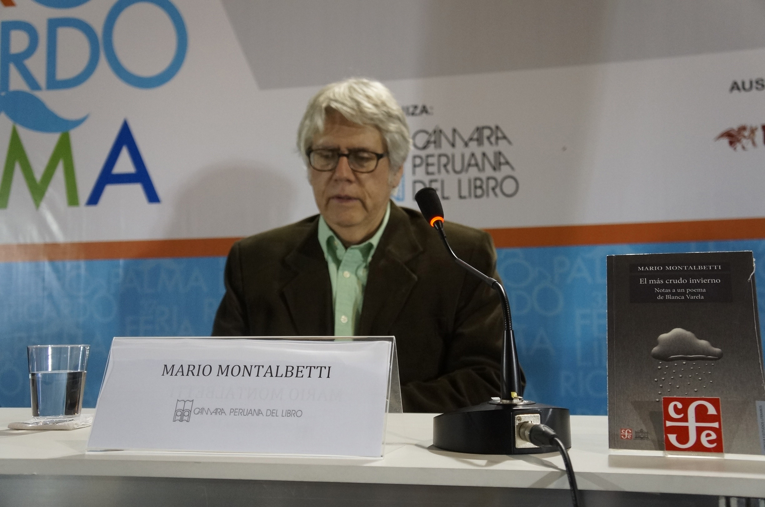 Mario Montalbetti Solari en 2016